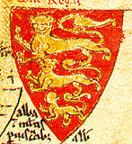 Erb Plantagenetů